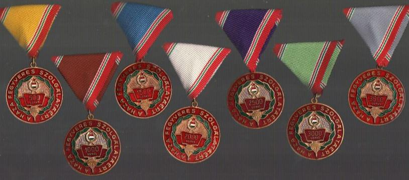 A haza fegyveres szolgálatáért-ejtőernyős sor